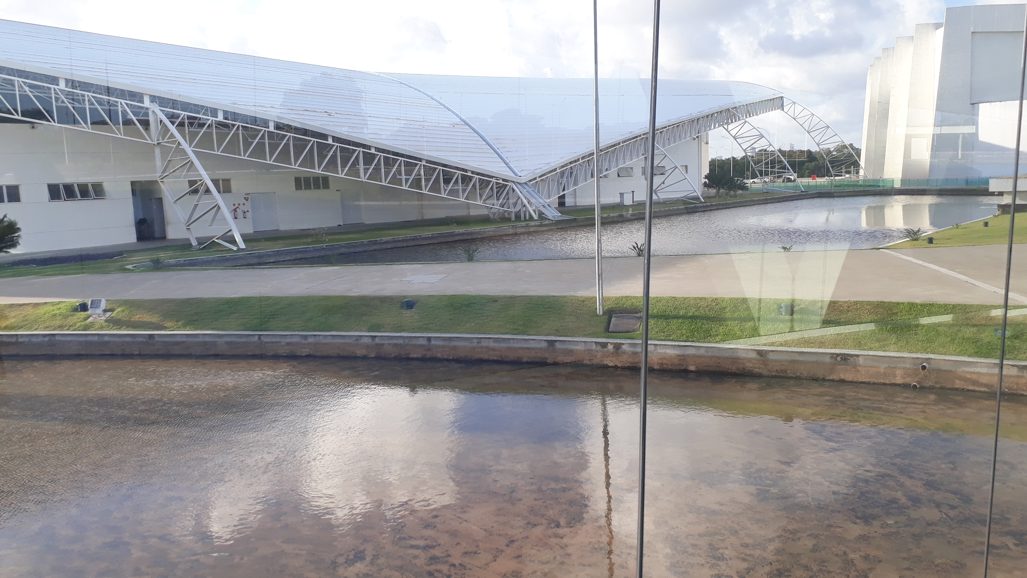 Foto do Pavilhão de Feiras e Exposições do Centro de Convenções Poeta Ronaldo Cunha Lima em João Pessoa PB